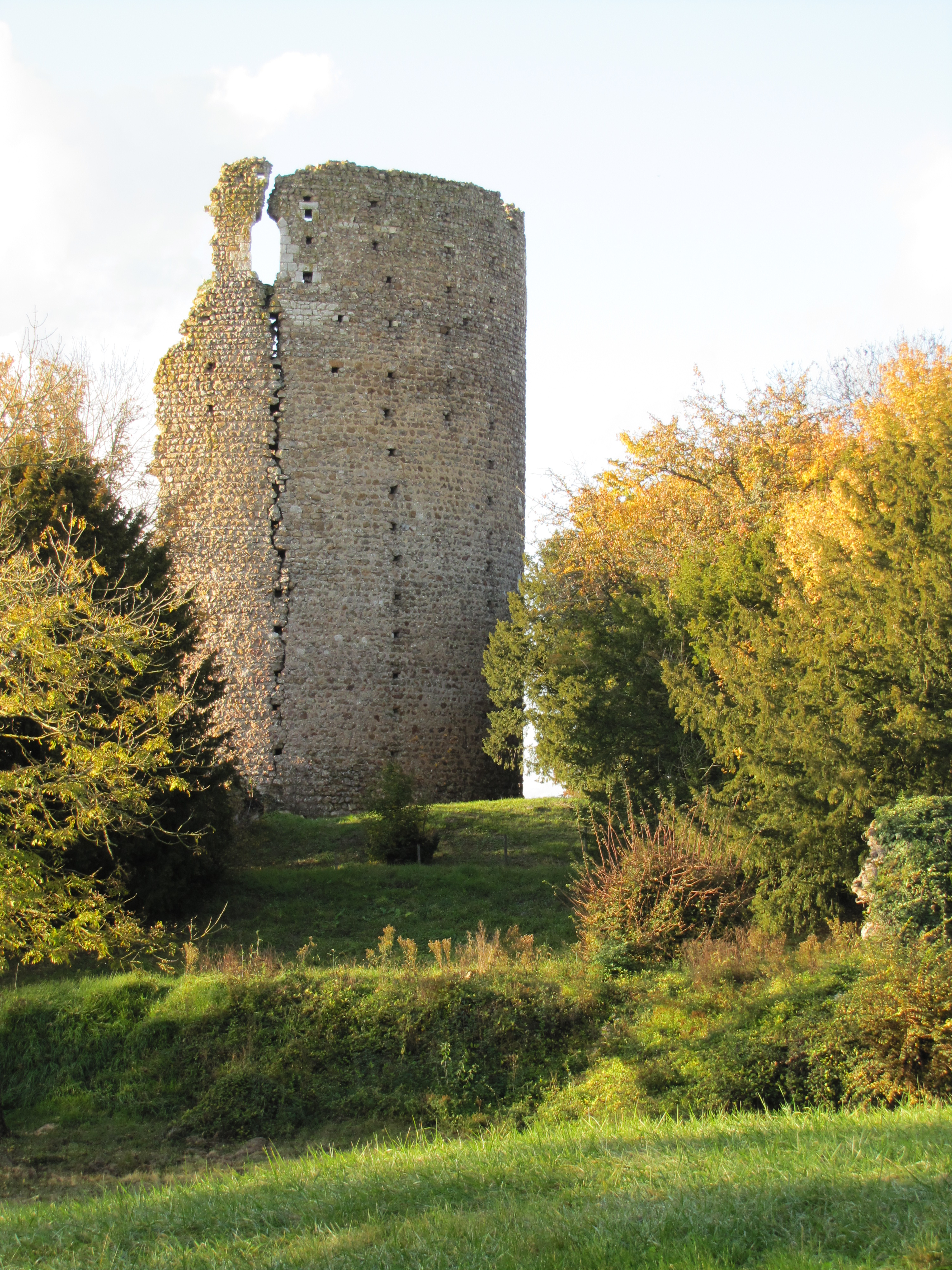 ruine du château